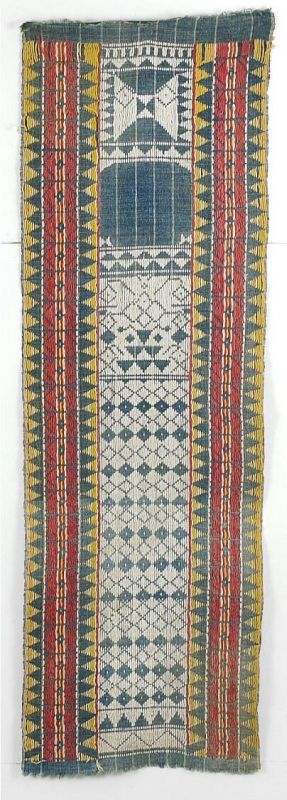 Tempelhanger. Tempelhanger van katoen Unknown language: Lamak